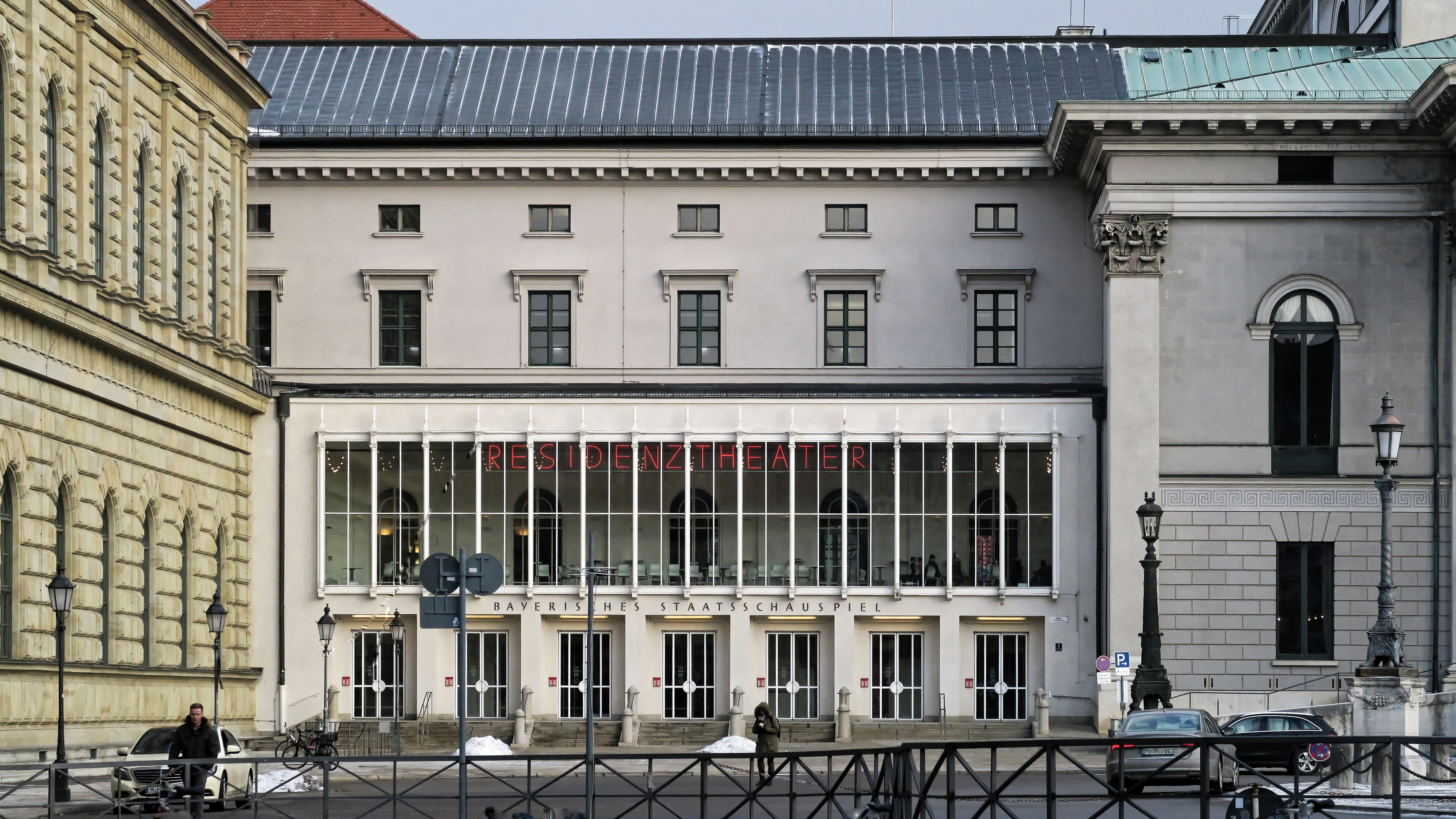 Außenansicht des Nationaltheaters, von der Ferne, links das Residenztheater, die Residenz ist angeschnitten